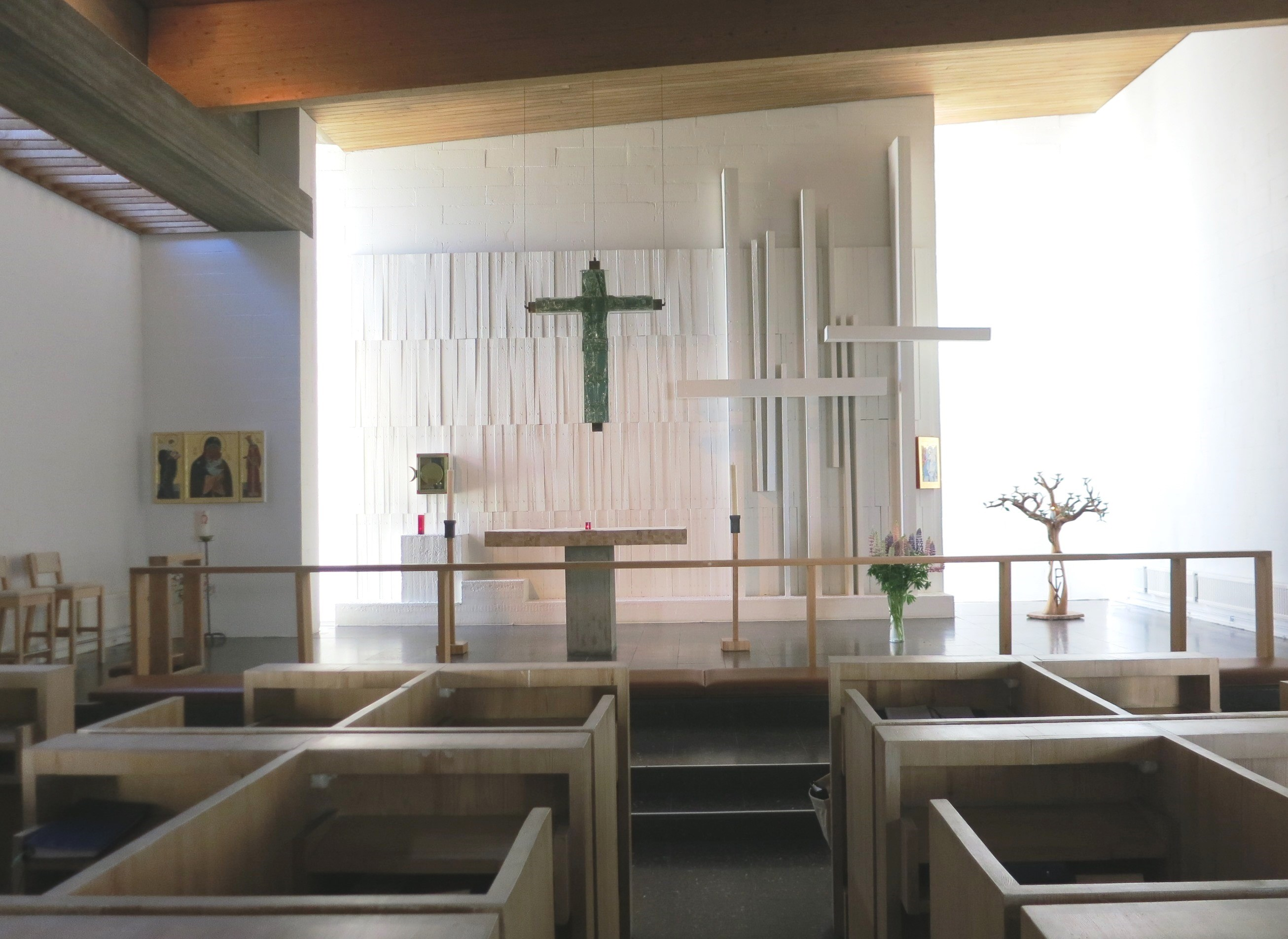 Retreatgården Berget utanför Rättvik i Dalarna